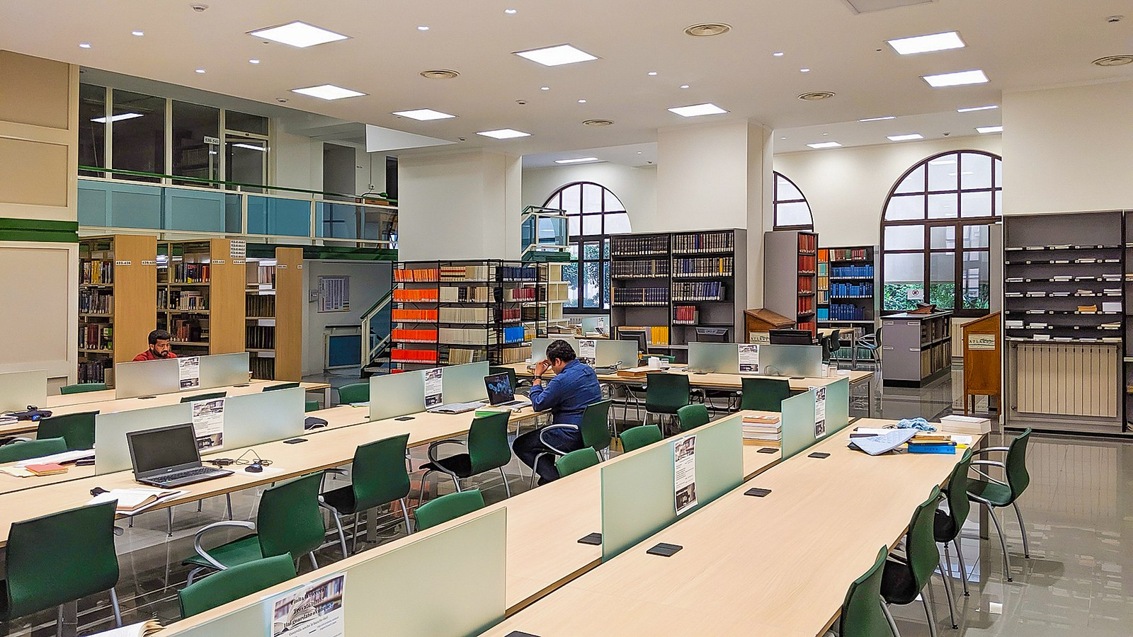 Students in library